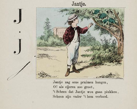 Jantje zag eens pruimen hangen uit het ABC-boekje van Van Alphen